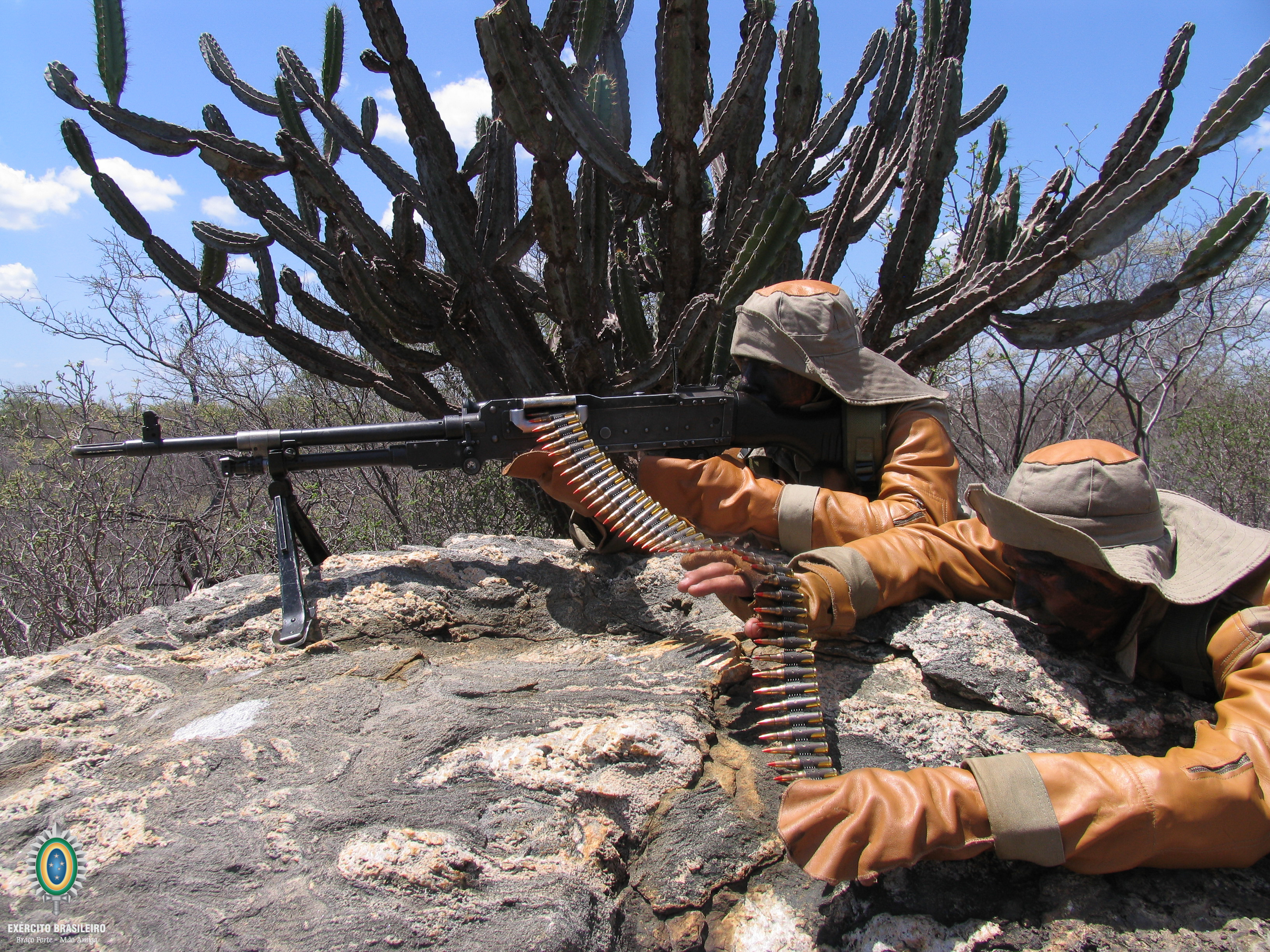 Foto: Ivan Cruz